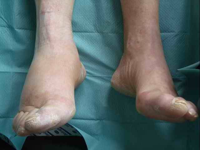 Geschwollener, schmerzunempfindlicher rechter Fuß ohne Hautverletzung bzw. Infektion bei Diabetes mellitus